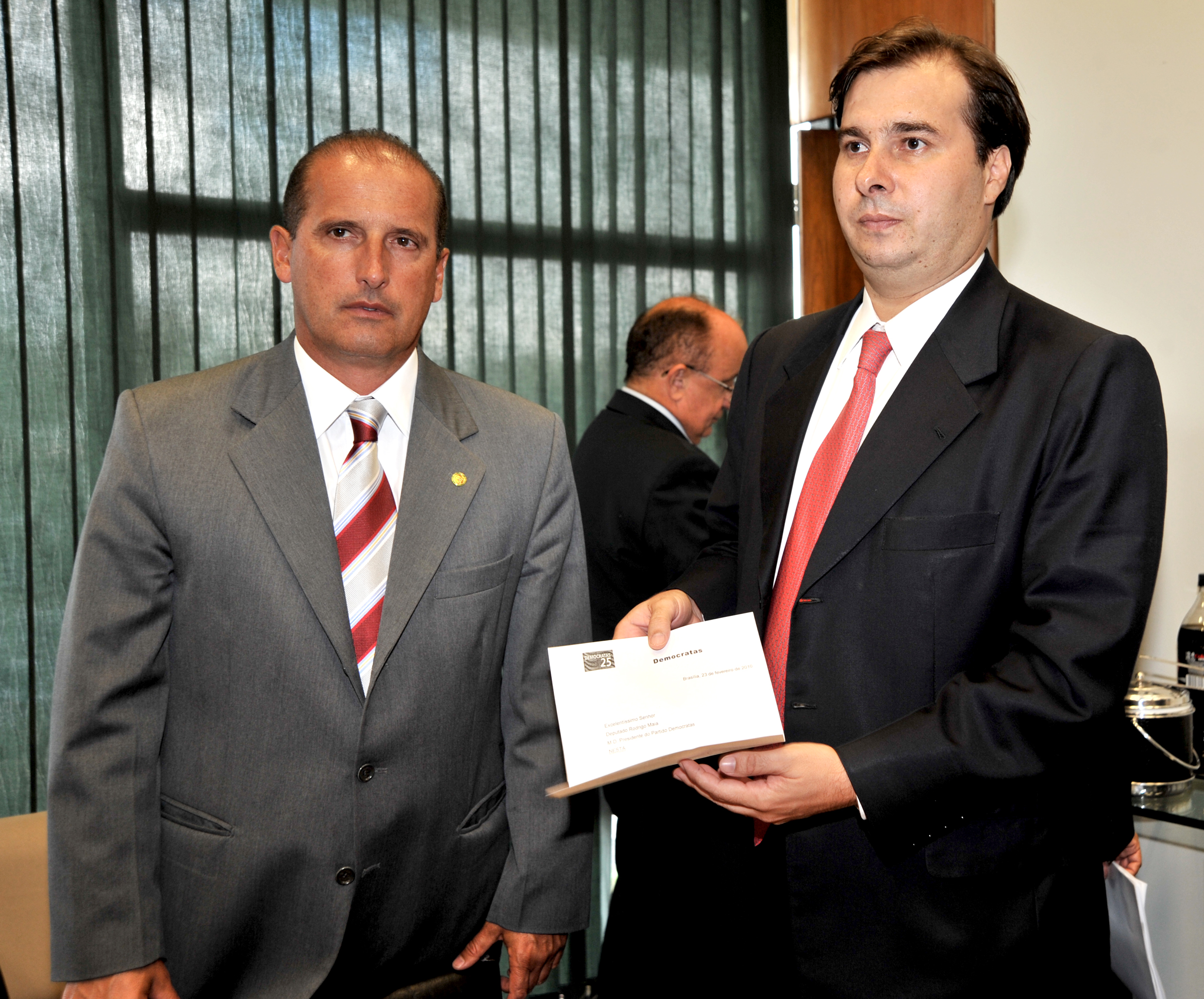 Brasília - O deputado Rodrigo Maia ao lado do deputado Onyx Lorenzoni, apresenta a carta de desfiliação do governador em exercício do Distrito Federal, Paulo Octávio do DEM